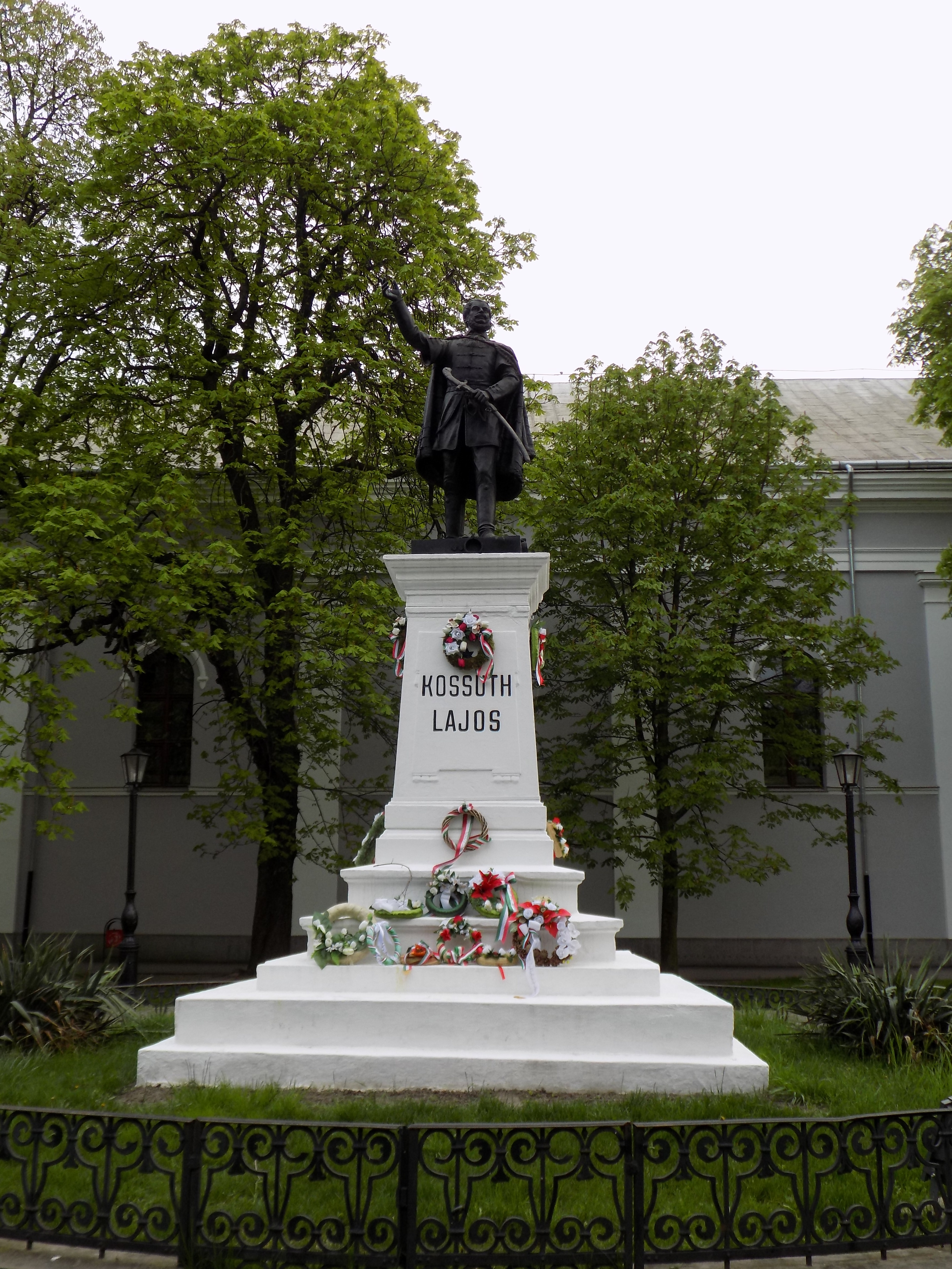 Kossuth Lajos Statue